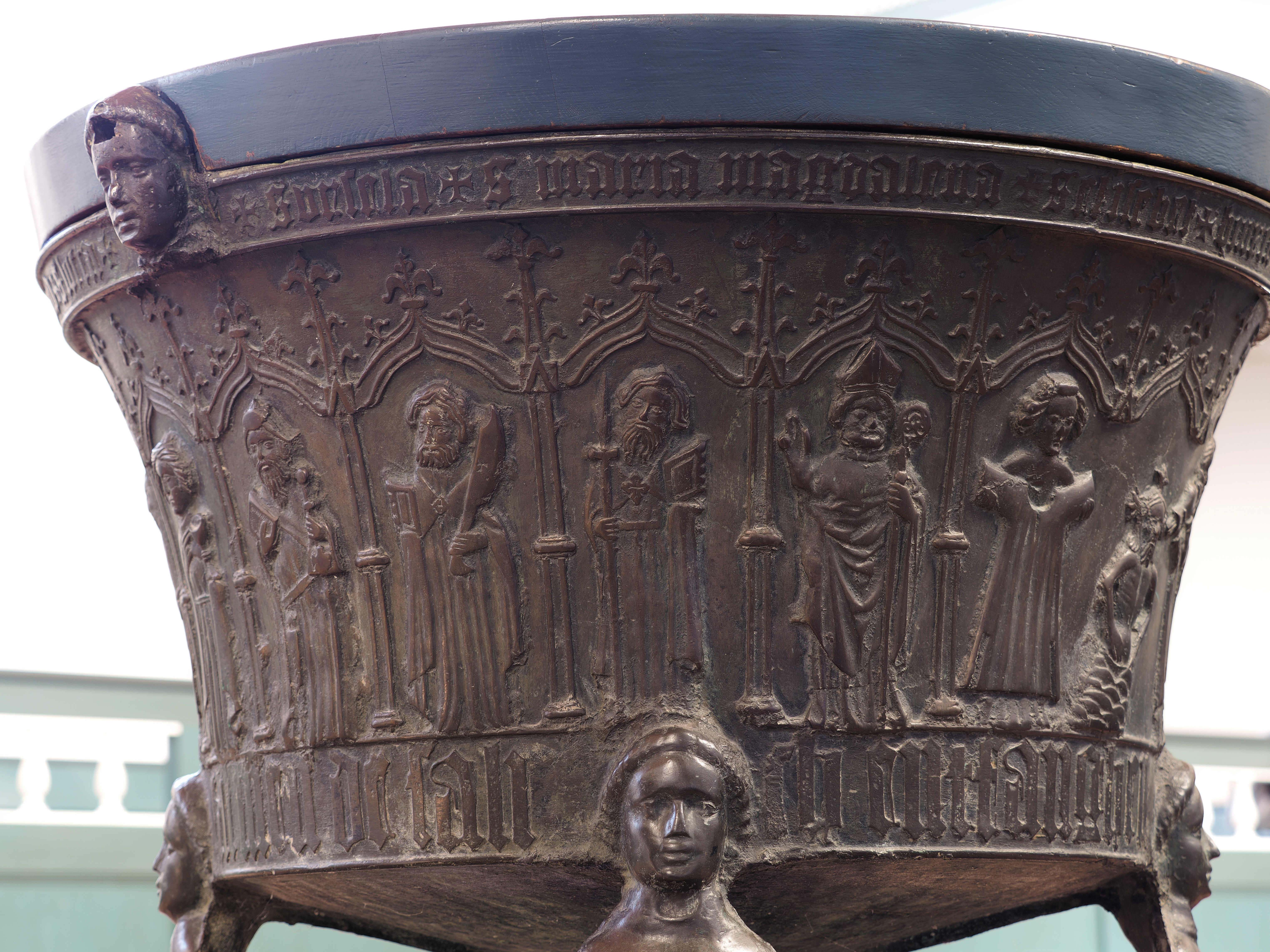 Gotisches bronzenes Taufbecken gegossen von Hinrich Klinghe in der ev. reformierten Kirche in Uttum (Ostfriesland) aus dem Jahr 1472. Ansicht von Nordwest.